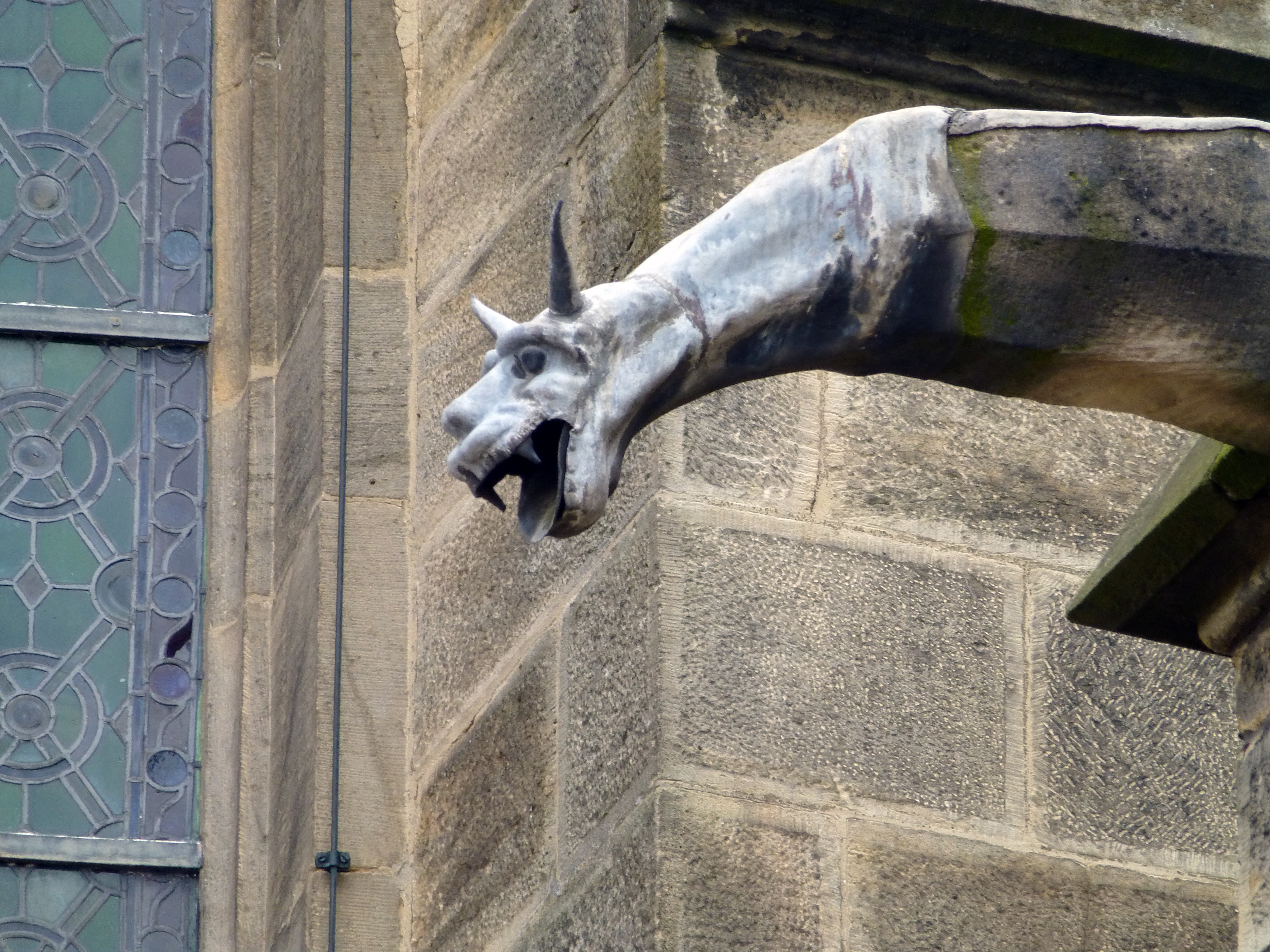 St. Bonifatius (Fulda-Horas) - Wasserspeier